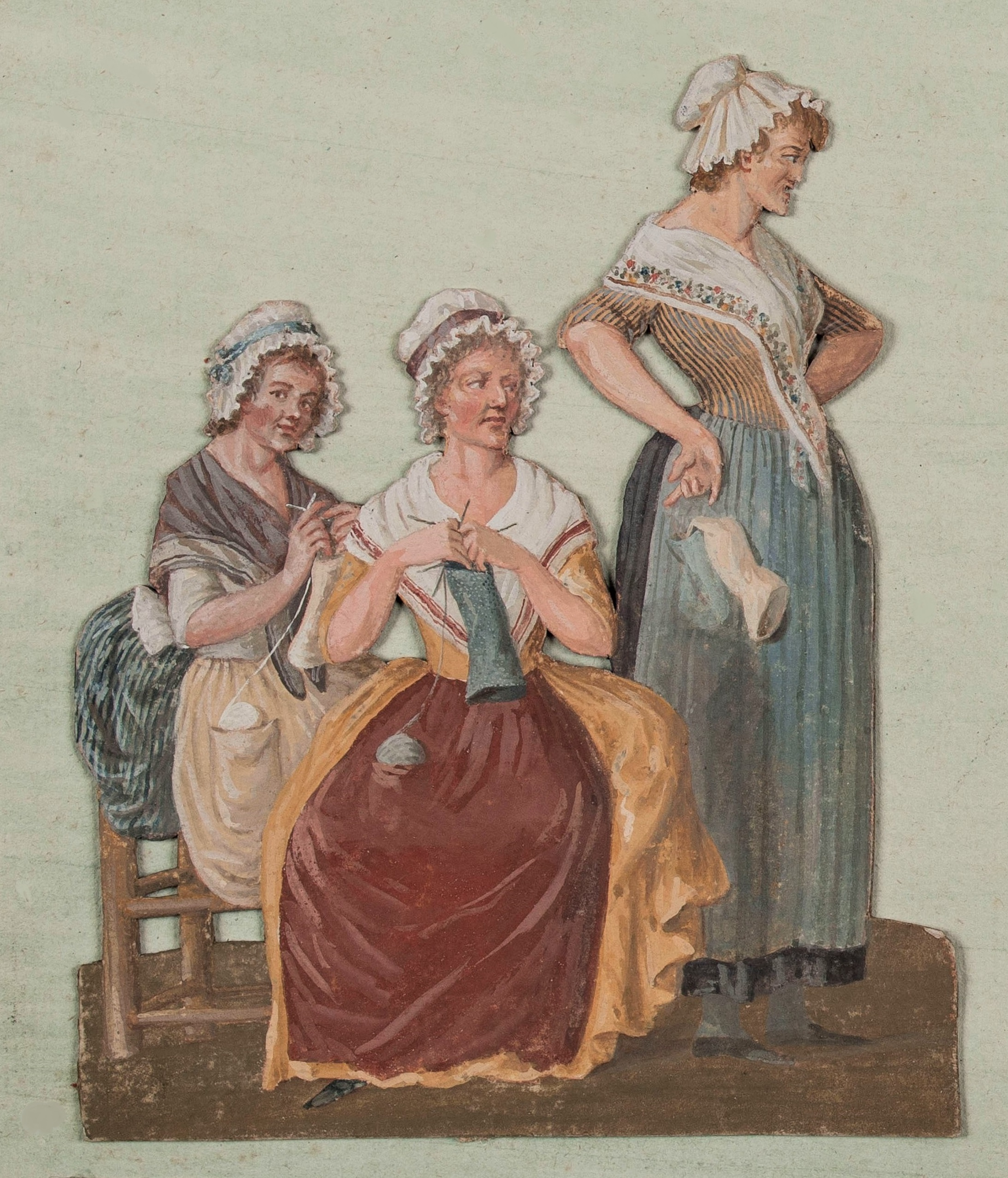 Jean-Baptiste Lesueur, Les Tricoteuses Jacobines, vers 1793. Gouache, Paris, musée Carnavalet [1]. Au recto, sous la gouache, une étiquette avec légende manuscrite à l'encre : « Les Tricoteuses Jacobines, ou de Robespierre. / Elles étoient un grand nombre à qui l'on donnoit / 40 sols par jour pour aller dans la tribune des Jacobins / applaudir les motions Révolutionnaires. »)